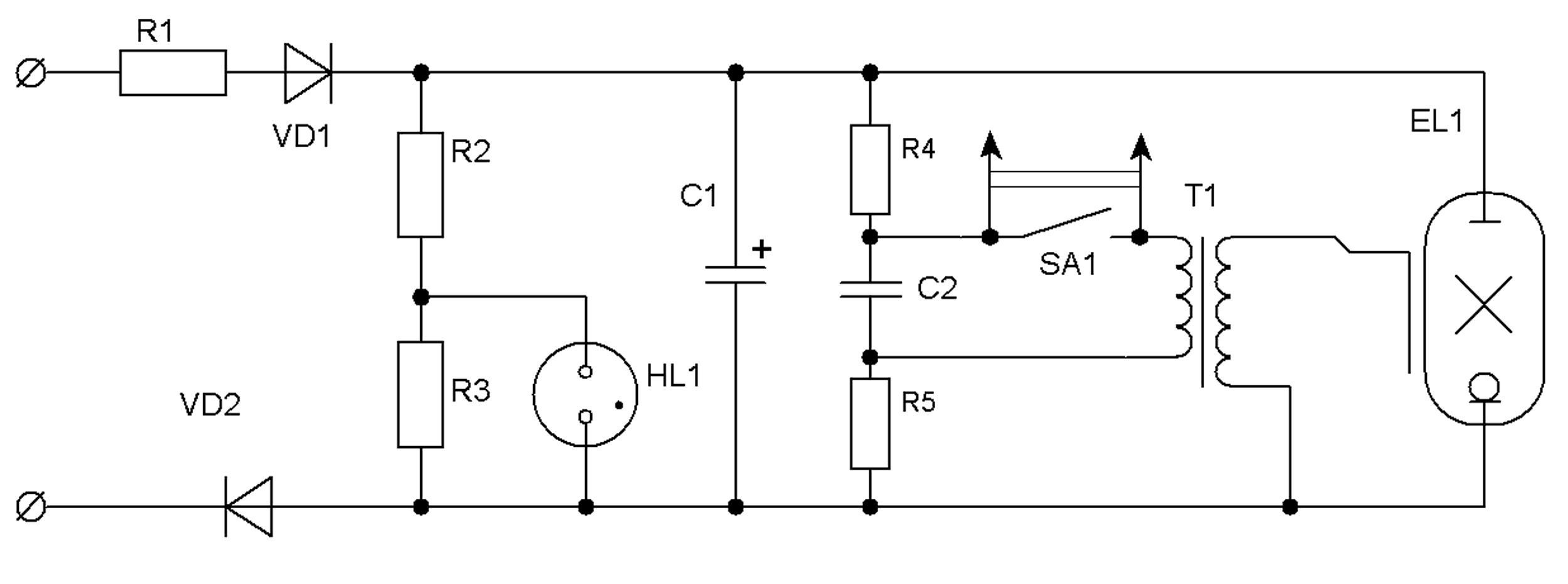 Схема электронной сетевой фотовспышки